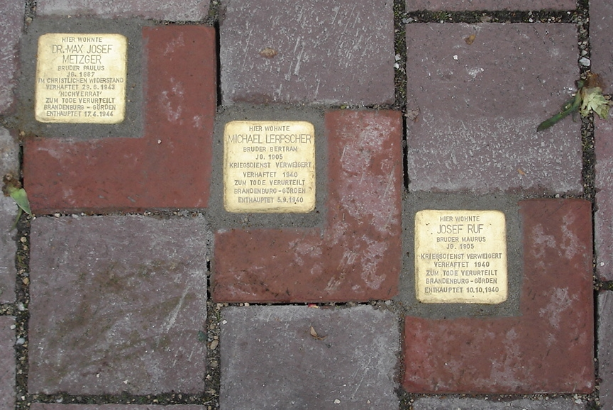 Stolpersteine in Meitingen,vor dem Christkönigs-Institut, St.-Wolfgang-Str. 14